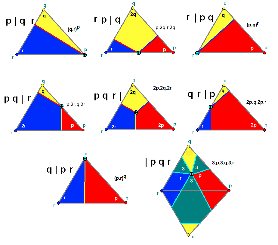 Construction de Wythoff en fonction du point générateur